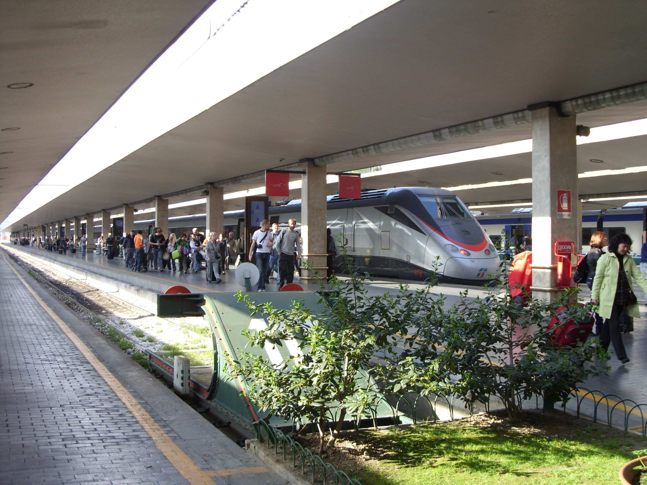 Pensilina e binario alta velocità